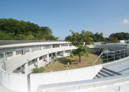 成安造形大学キャンパス画像